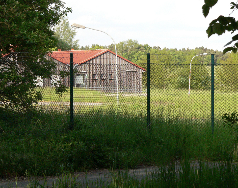 Betriebsgebäude auf dem Gelände der Sonderabfalldeponie Münchehagen